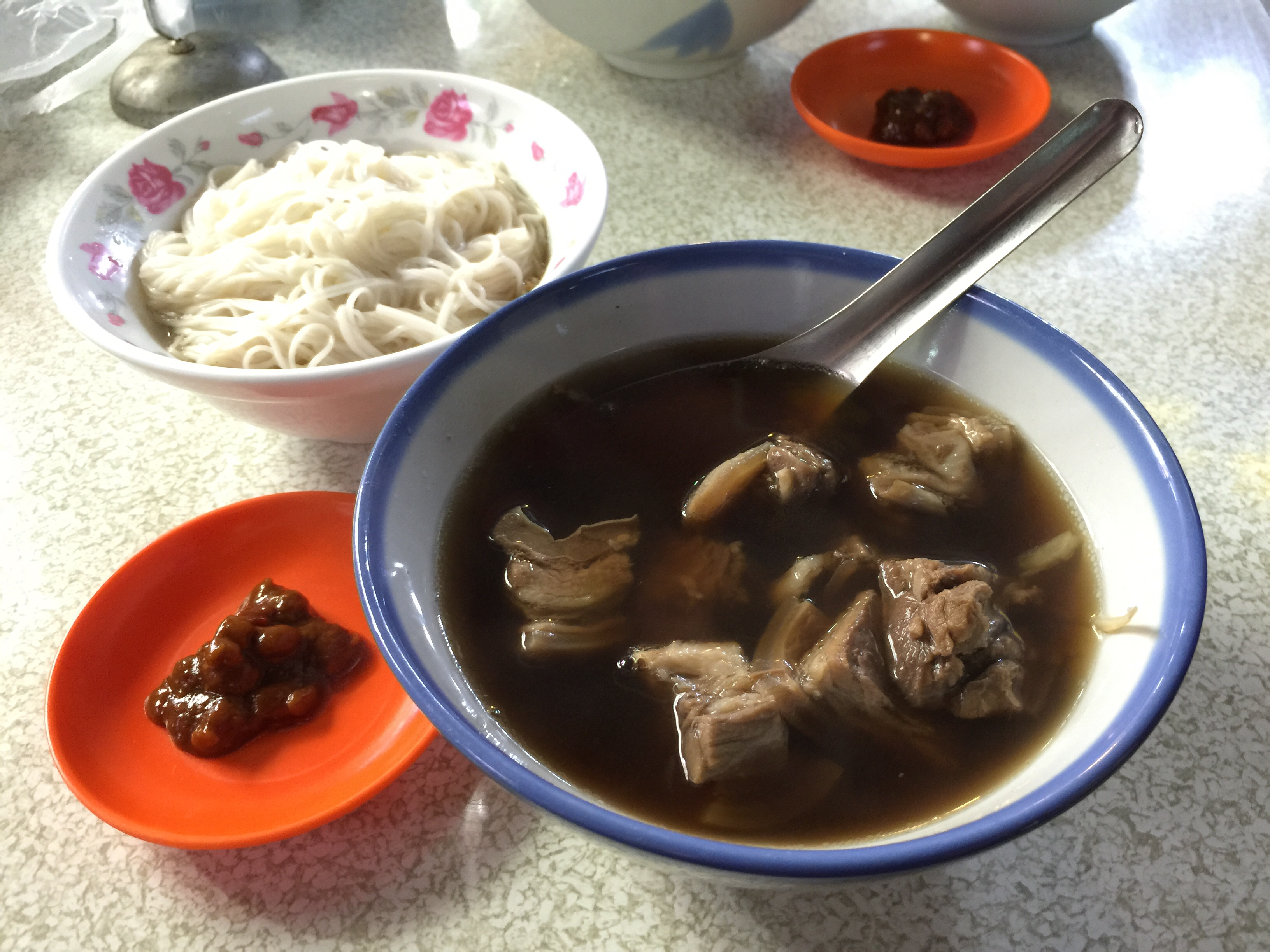 乾麵線, 當歸燉肉湯, 蔡記岡山羊肉, 台北